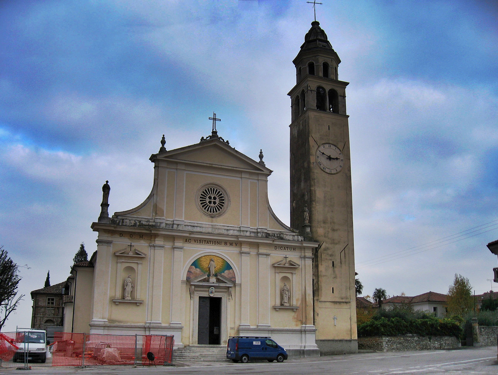 Cavaso del Tomba: Chiesa della Visitazione di Santa Maria a Elisabetta.